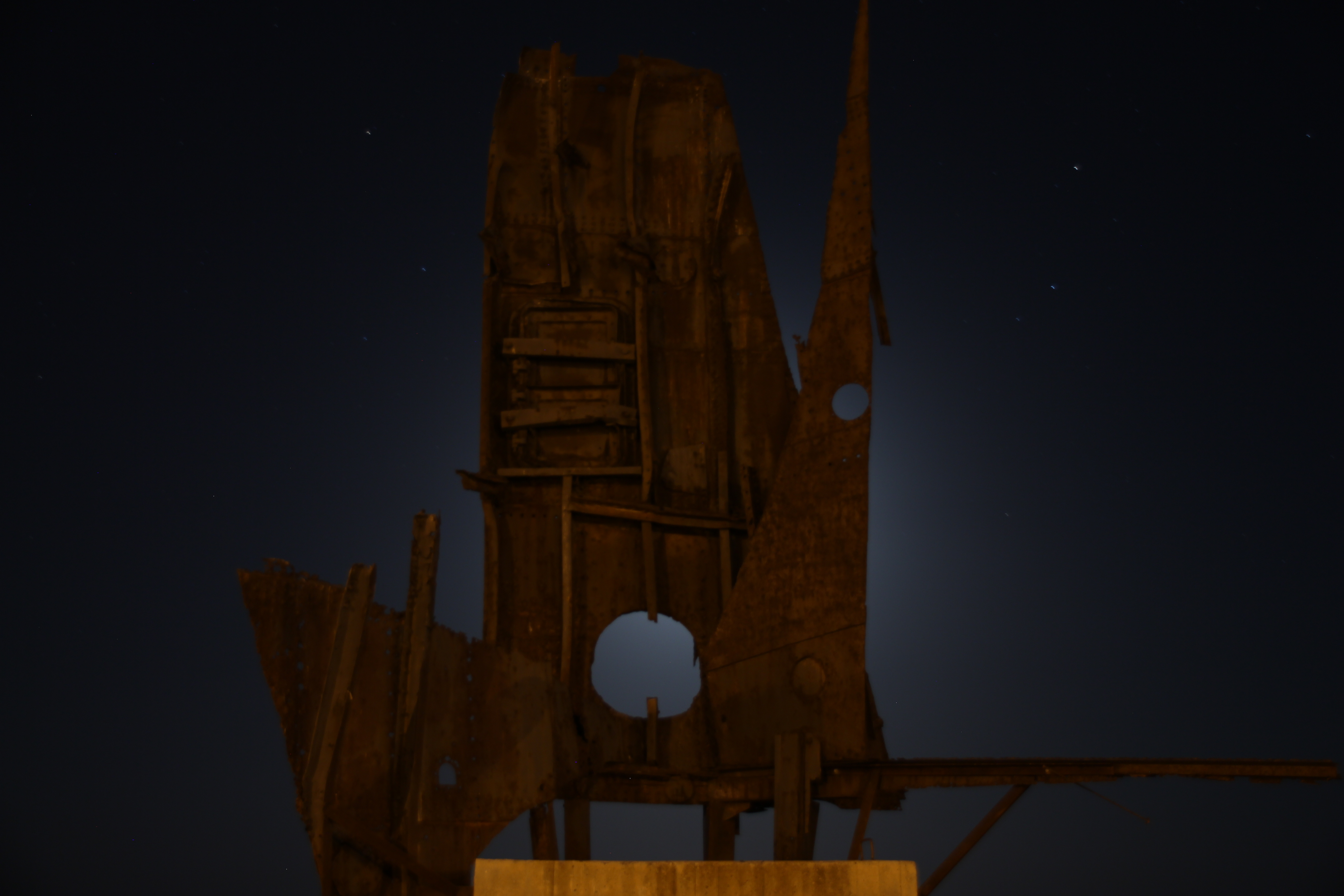 פסל על הים בחוף אכזיב לזכר המעפילים. צילום בשעת לילה